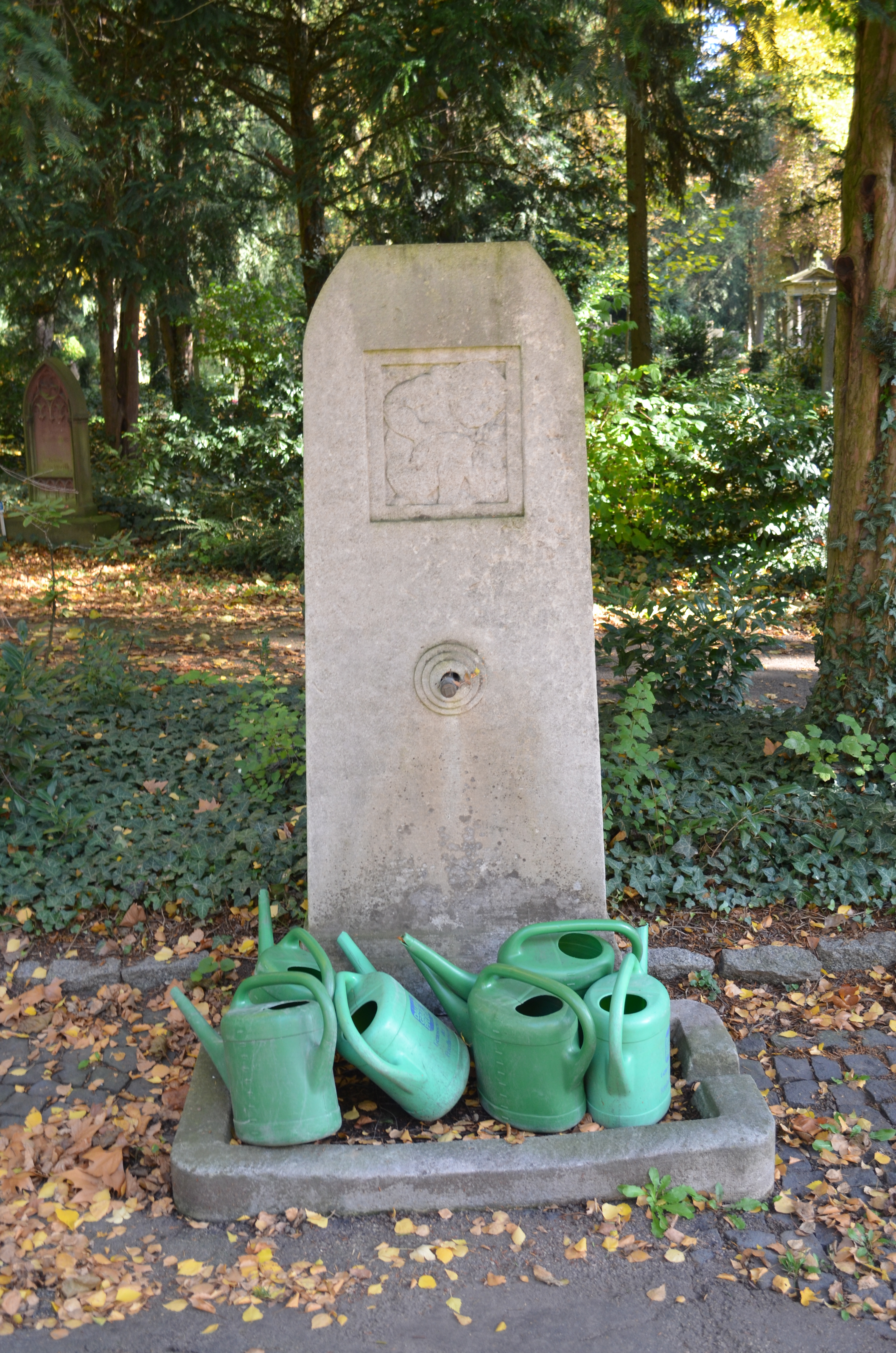 Frankfurt, Hauptfriedhof, Brunnen bei A 82